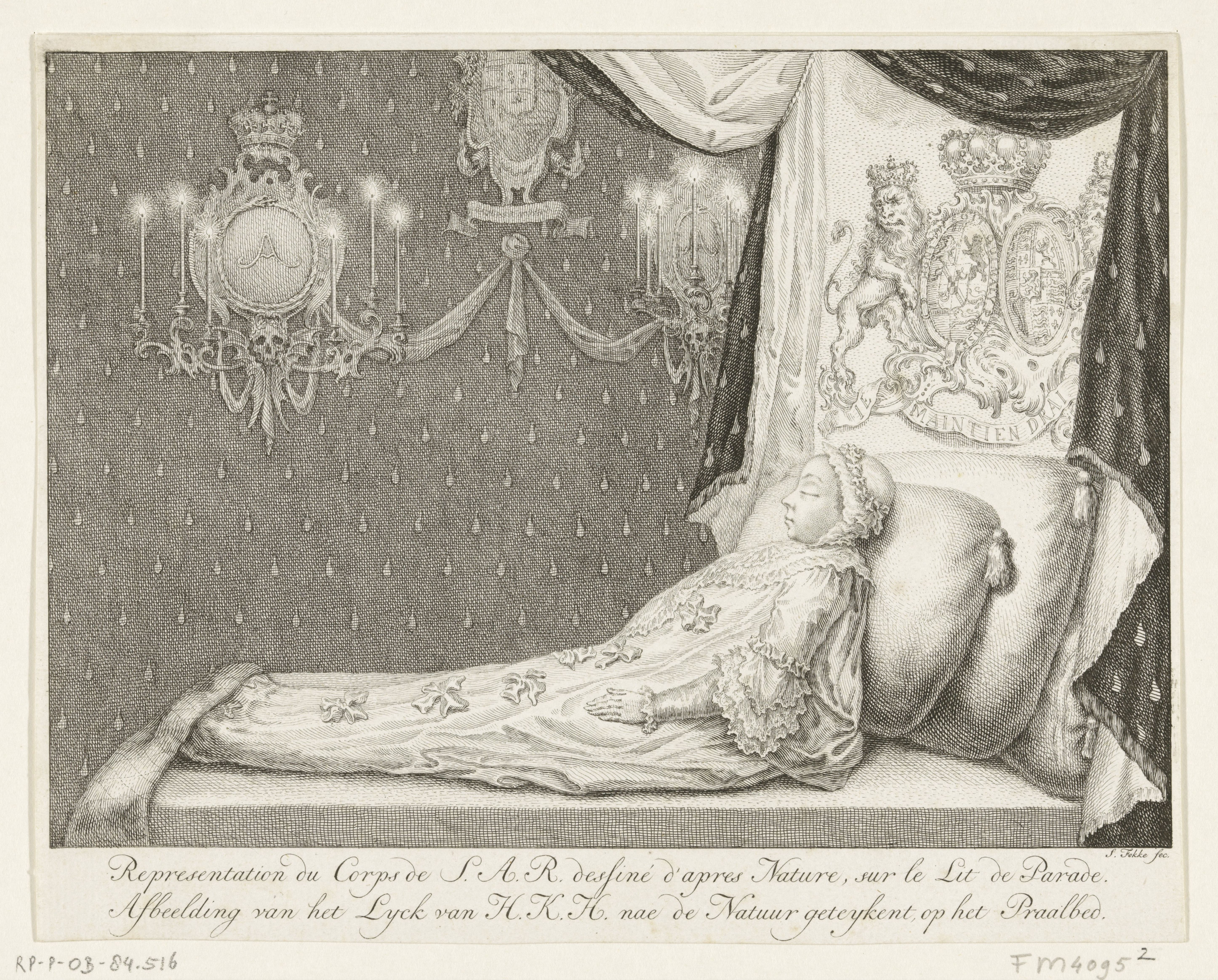 IdentificatieTitel(s): Opgebaarde lijk van prinses Anna, 1759Representation du Corps de S.A.R. (...) / Afbeelding van het Lyck van H.K.H. nae de Natuur geteykent op het Praalbed (titel op object)Praalbed van prinses Anna (serietitel)Objecttype: prent Objectnummer: RP-P-OB-84.516Catalogusreferentie: FMH 4095-2Atlas van Stolk 4080Omschrijving: Het opgebaarde lijk van de prinses op het praalbed. Onderdeel van een serie van vier platen van het praalbed waarop de op 12 januari 1759 overleden prinses Anna van Hannover gedurende enkele dagen in februari opgebaard heeft gelegen.VervaardigingVervaardiger: prentmaker: Simon Fokke (vermeld op object) naar tekening van: Pieter de SwartPlaats vervaardiging: Noordelijke NederlandenDatering: 1759Fysieke kenmerken: ets en gravureMateriaal: papier Techniek: etsen / graveren (drukprocedé)Afmetingen: blad: h 182 mm × b 230 mmOnderwerpWat: lying in stateDood van Anna van Hannover (1759)Wanneer: 1759-02 - 1759-02Wie: Anna van HannoverVerwerving en rechtenVerwerving: aankoop 1881Copyright: Publiek domein